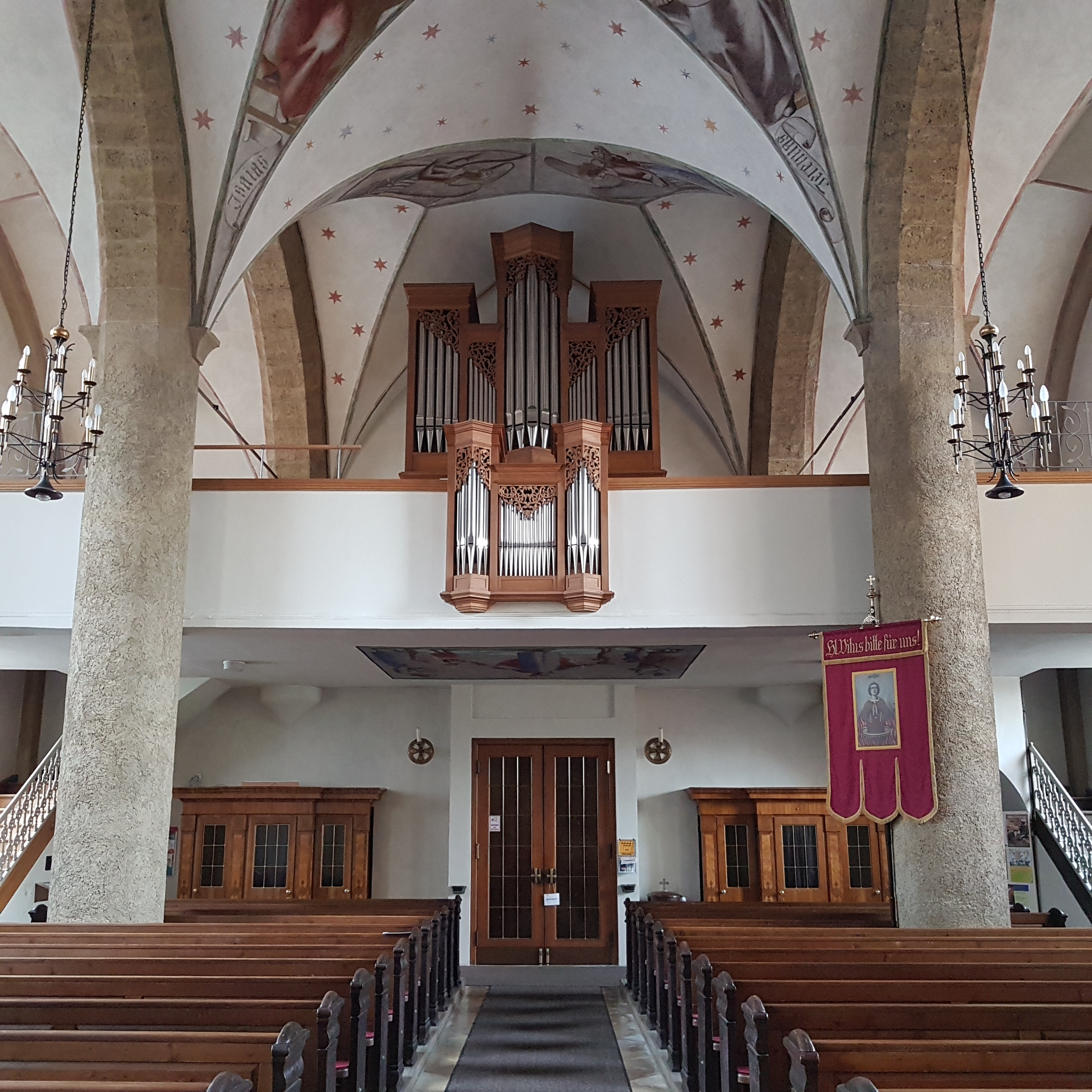 Pfarrkirche St. Vitus Kufstein